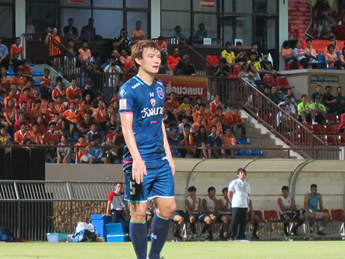 Panuwat Failai